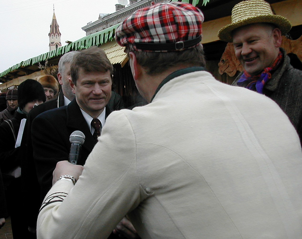 Rolandas Paksas as president of Lithuania, during Kaziukas Fair in Vilnius.